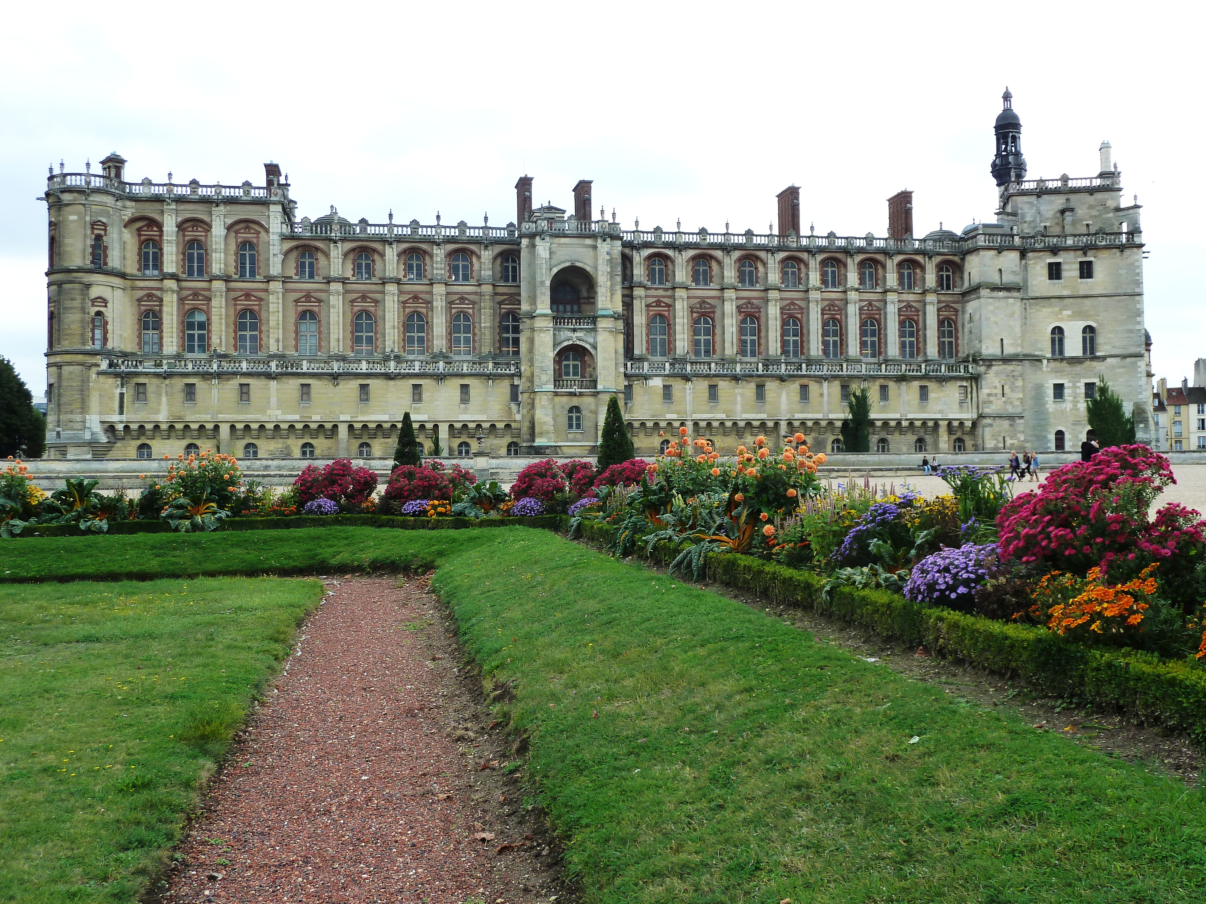 Saint-German-en-Laye - Chateau